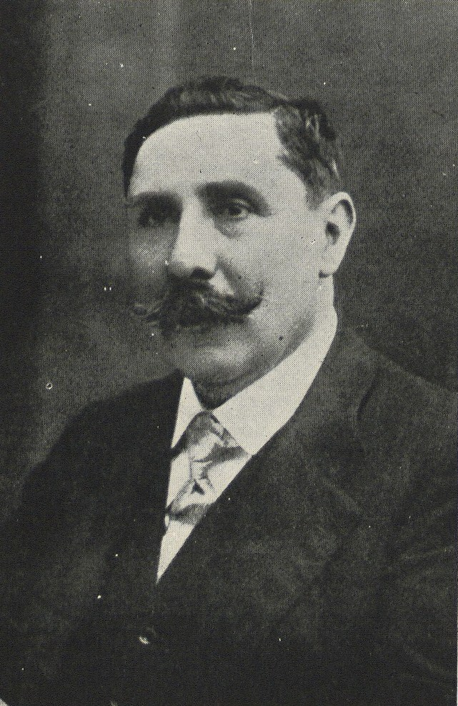 Ramón Laval Alvial (1862–1929) fue un escritor, bibliógrafo y folklorista chileno. En este ultimo campo fue uno de los más importantes de principios del siglo XX; dedicó gran parte de su tiempo libre a su cultivo y llegó a ser el más reputado especialista chileno junto con Julio Vicuña Cifuentes y Rodolfo Lenz